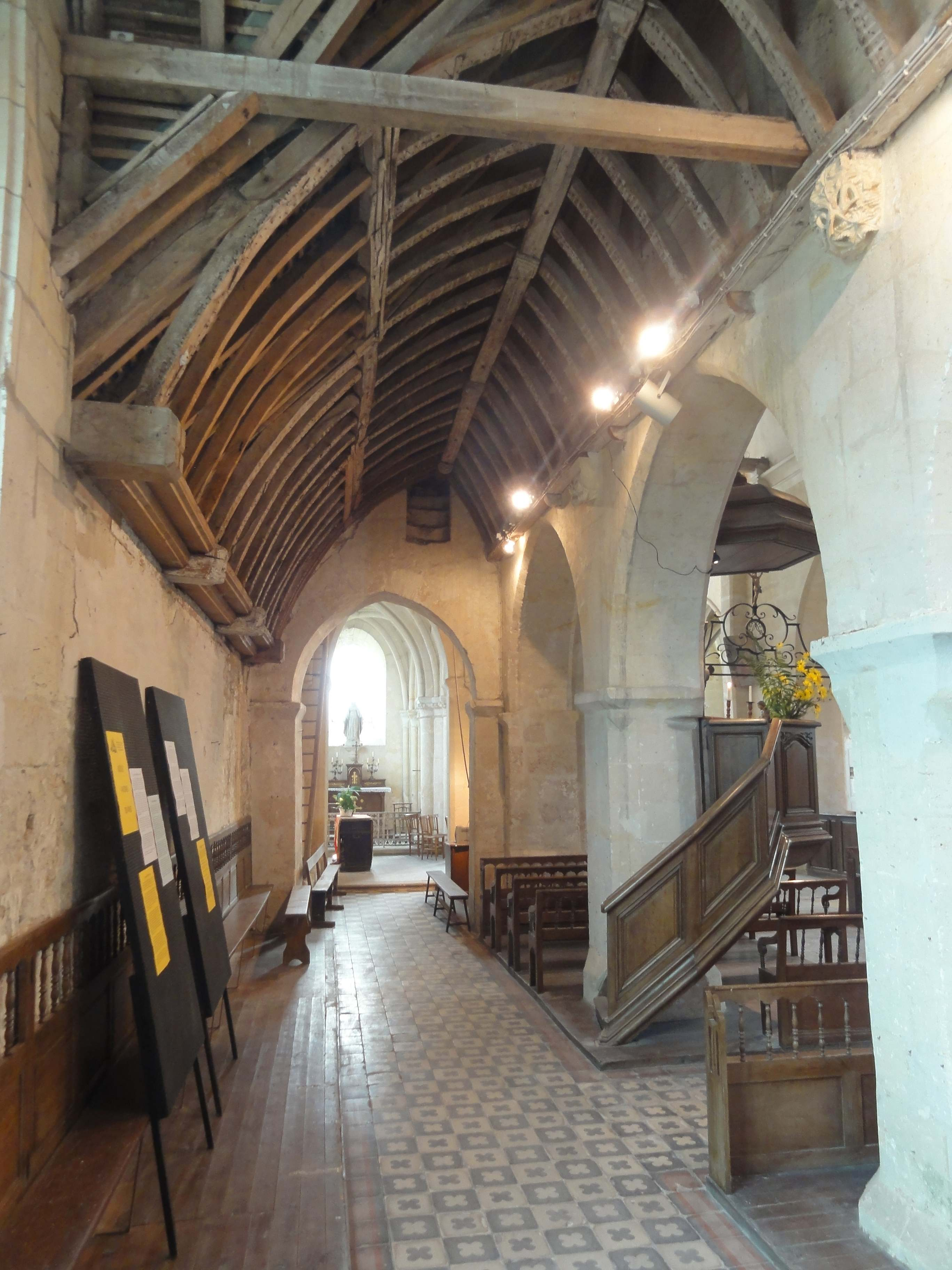 Intérieur de l'église - voir titre.